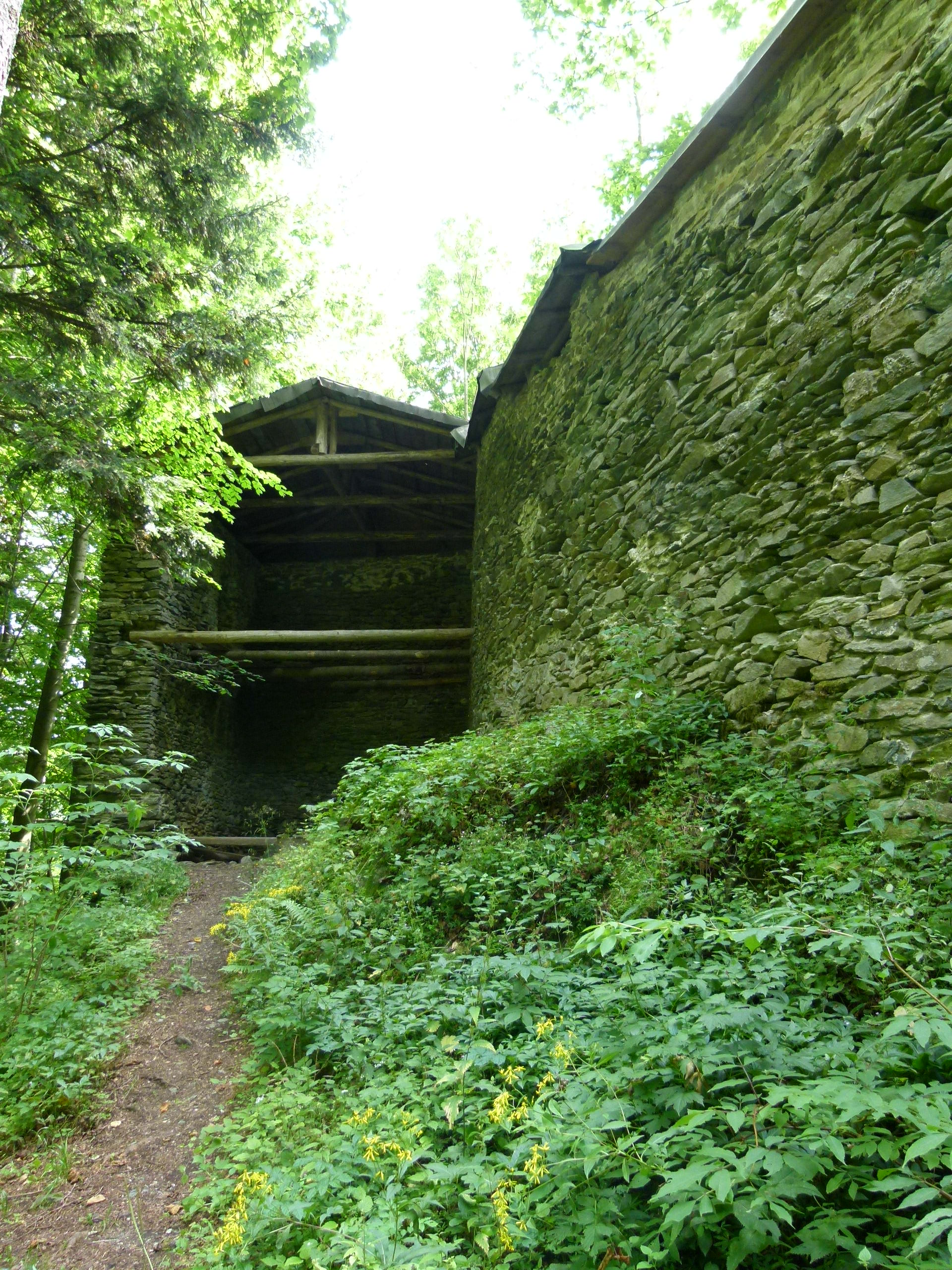 Hrad Štěpanický, zřícenina (Dolní Štěpanice), pod podplužním dvorem, Dolní Štěpanice